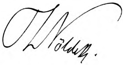 Signatur von Theodor Nöldeke